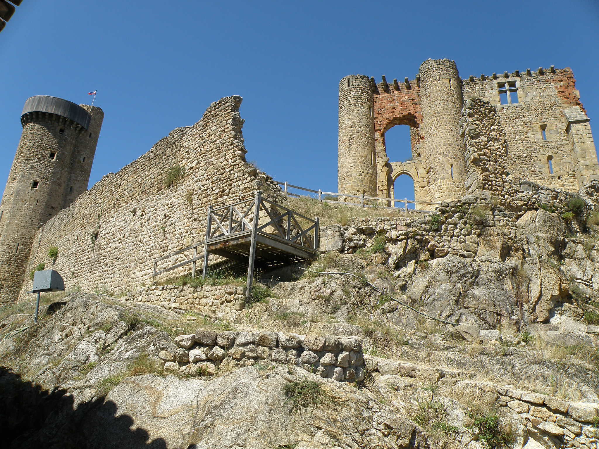 Château de Rochebaron, sis dans la commune de Bas-en-Basset, dép. de la Haute-Loire, France (région Auvergne). Tour ronde (à gauche, parfois appelée donjon, avec sa tourelle d'escalier) et le complexe porterie/chapelle (à droite). Plus à l'avant-plan à gauche : segment de muraille d'enceinte délimitant le château proprement dit. L'observateur se tient dans la basse-cour au sud du château, près de la ferme d'accueil.